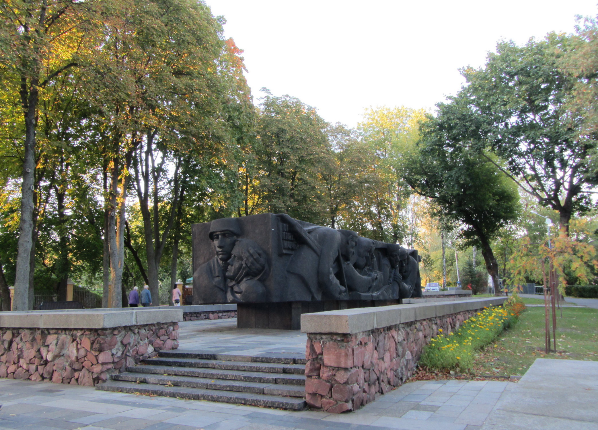 Беларуская (тарашкевіца): Братэрская магіла. г. Гомель This is a photo of Belarusian heritage monument. Reference number: 313Г000011 ( WLM)